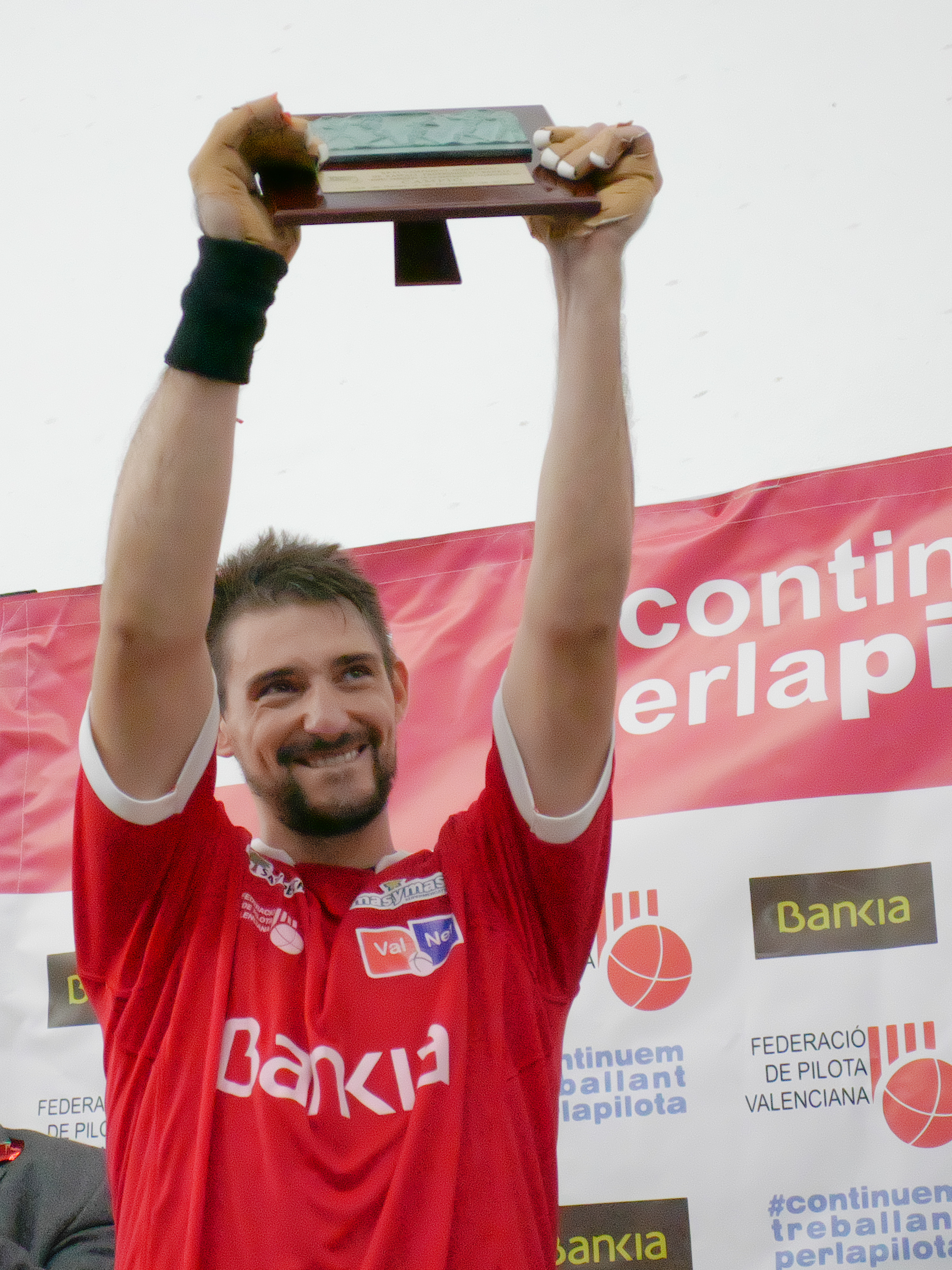 el massamagrellenc Soro III alça el seu quint Trofeu President de la Generalitat Valenciana com a guanyador del XXXII Campionat Individual d'Escala i Corda.